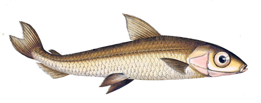 Argentina sphyraena